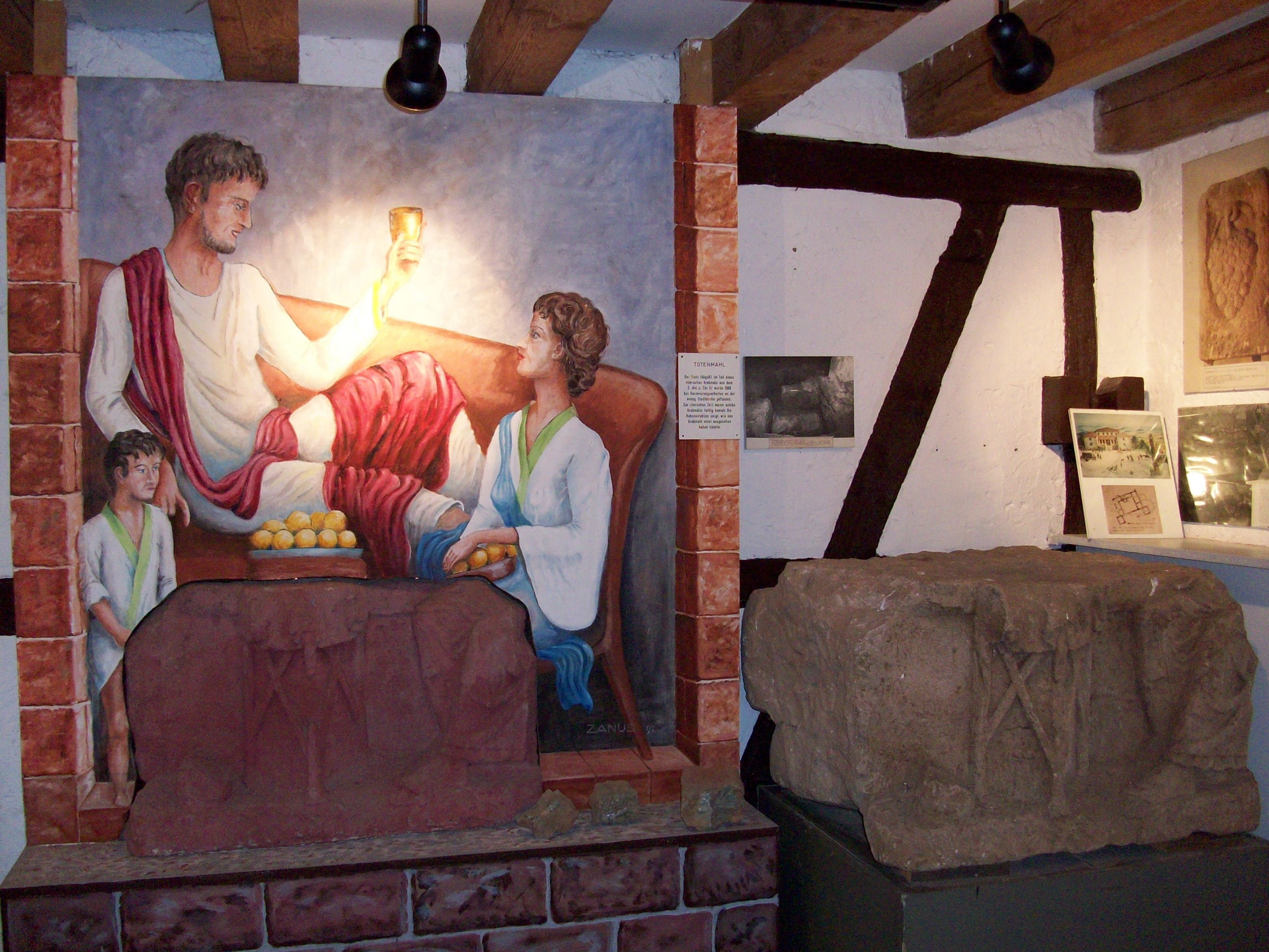 Museum und Kulturzentrum Gruberhof: Reste eines Römischen Grabdenkmals aus dem 2. Jahrhundert (rechts) mit Darstellung aus heutiger Sicht (links) in einem Bild von Hans Zanus, Groß-Umstadt, (1992). Die originalen Grabreste wurden Ende der 1960er Jahre bei der Sanierung unter der Groß-Umstädter Stadtkirche unter den Resten einer villa rustica gefunden. Am rechten oberen Bildrand sieht man die Replik des Traubensteines, ebenfalls bei den Ausgrabungen unter der Stadtkirche gefunden. Heute ist es das Logo des Umstädter Museums- und Geschichtsvereins e.V.